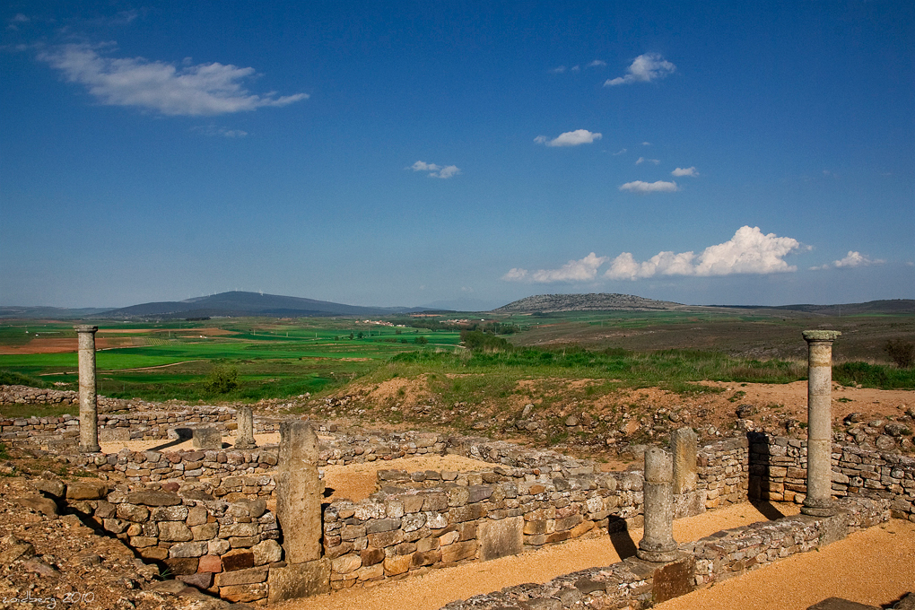 Numancia